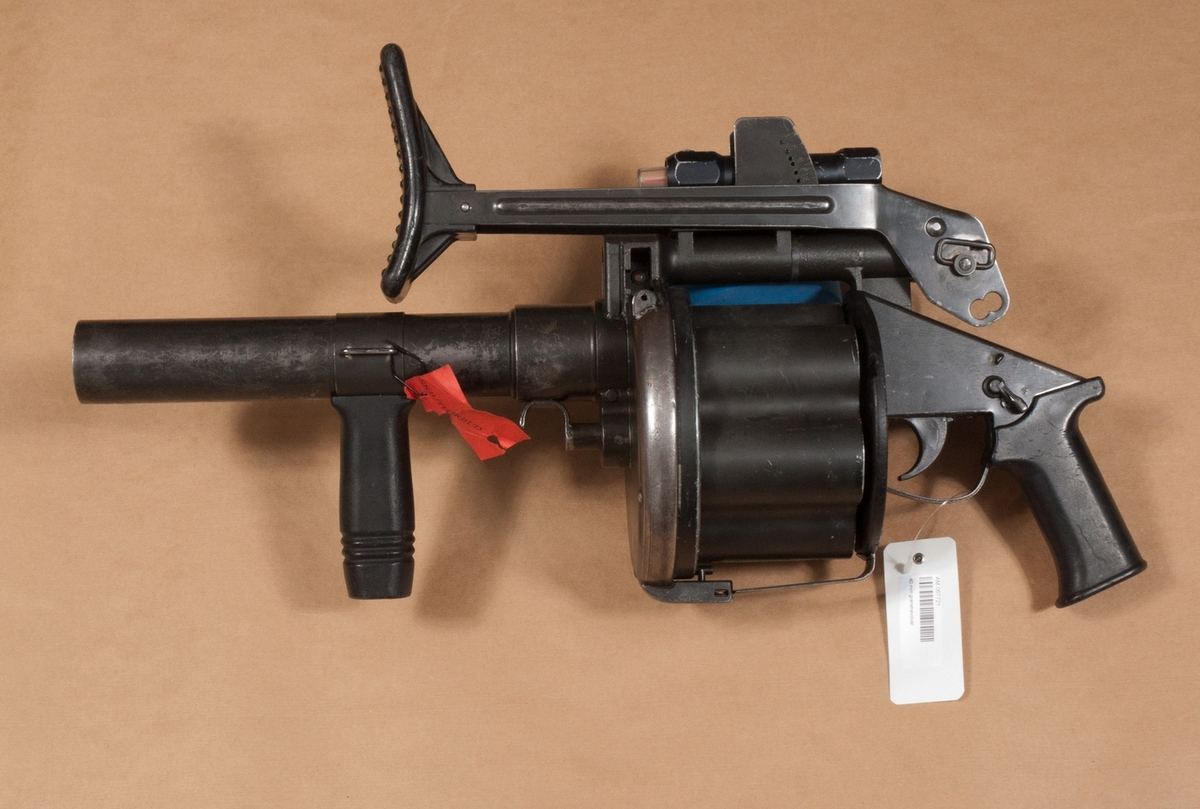 6 granater ryms i magasinet. Skjuter max 375 meter.